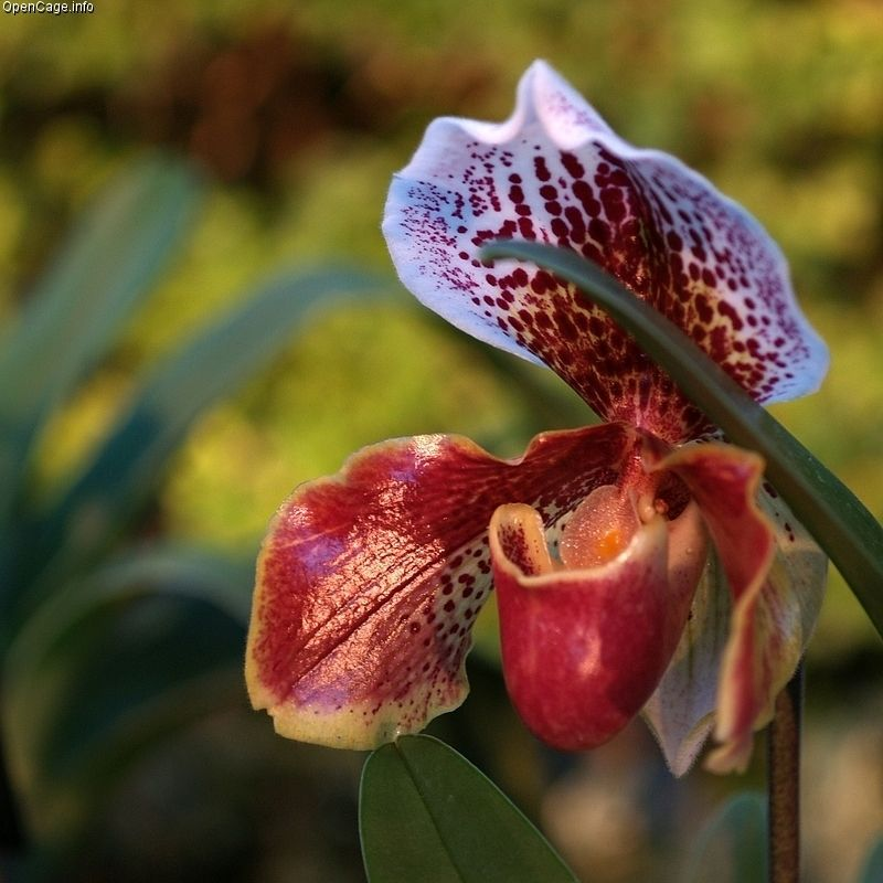 パフィオペディルム Paphiopedilum Paphiopedilum ミヤ・インディアン・ビューティーという品種とのこと。